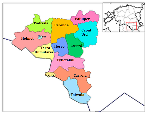 Valgae municipia Latine